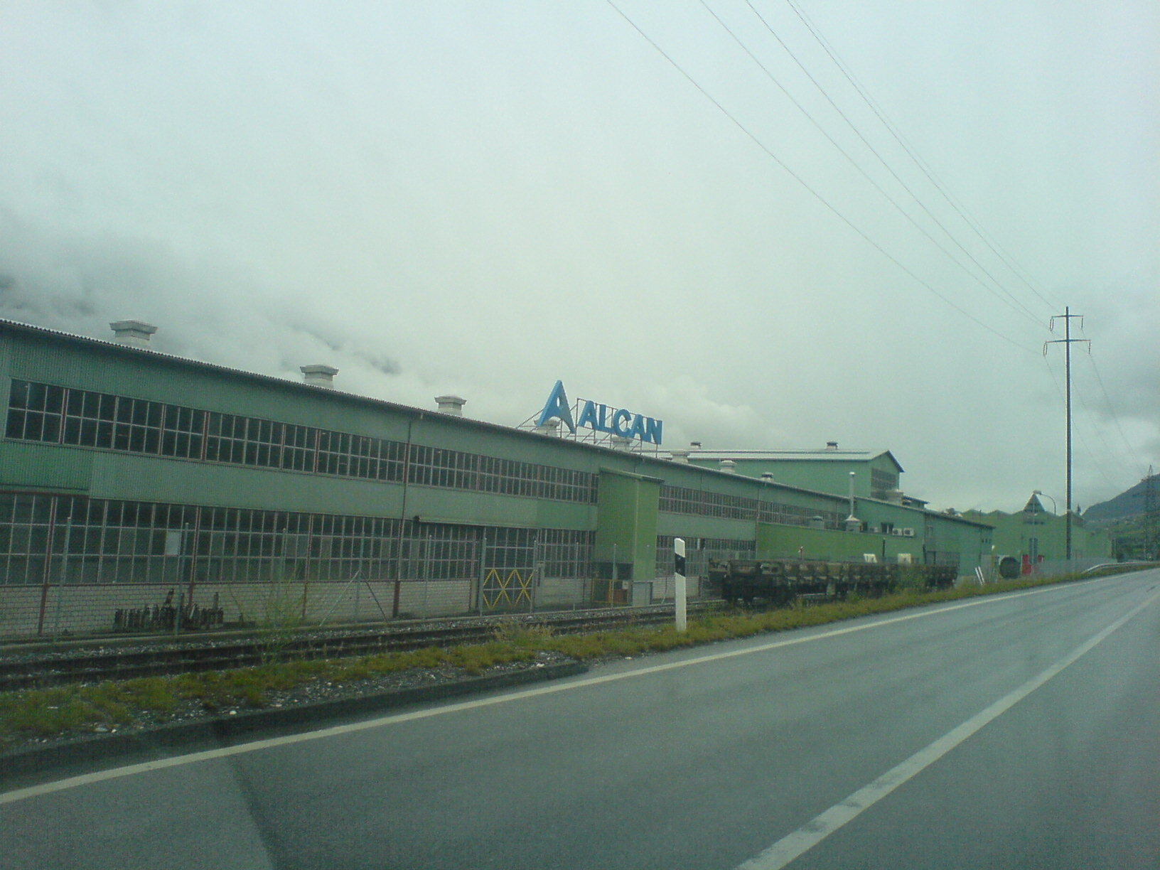 Alcan in Sierre, Valais, Switzerland